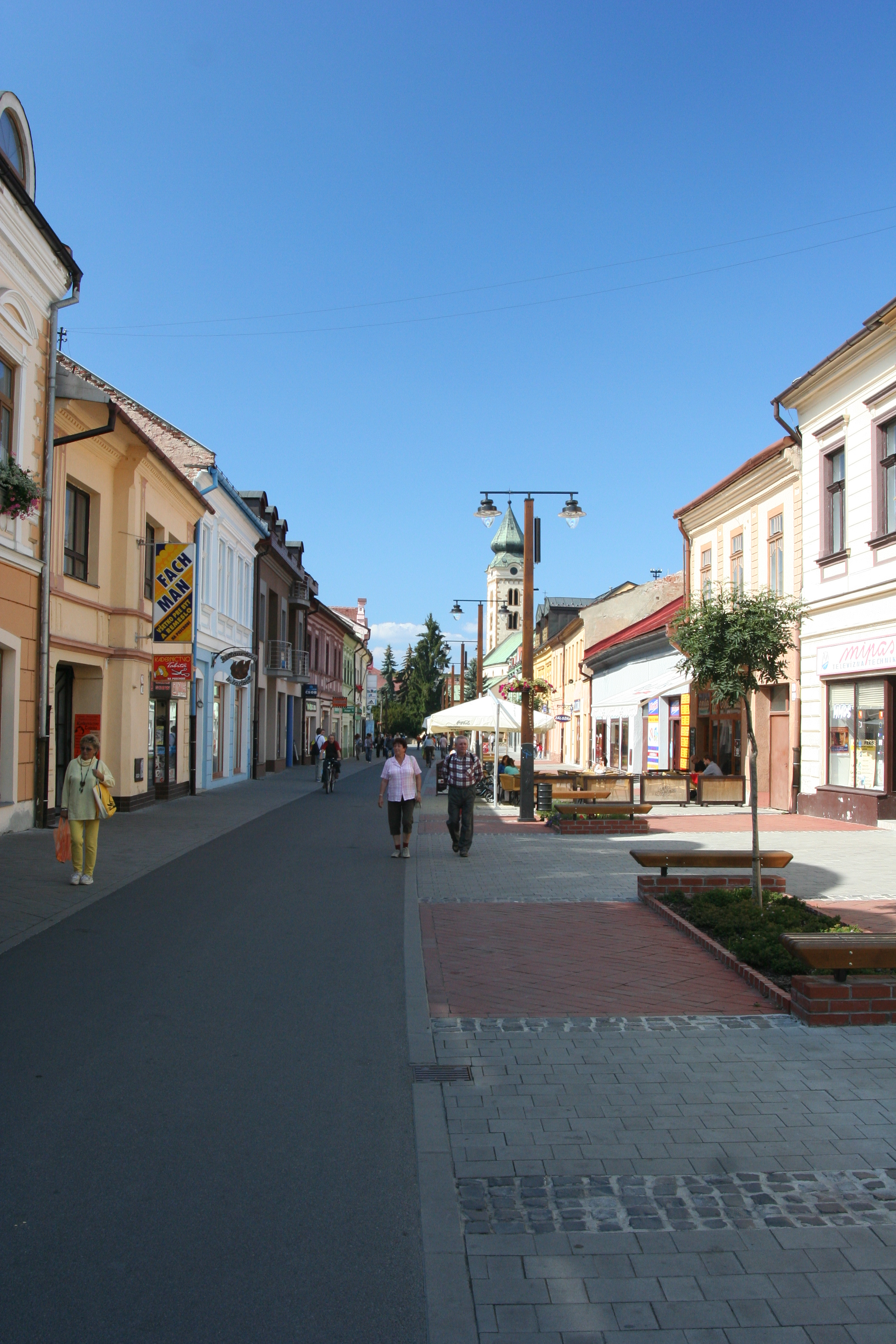 Liptovský Mikuláš, Slovakia.